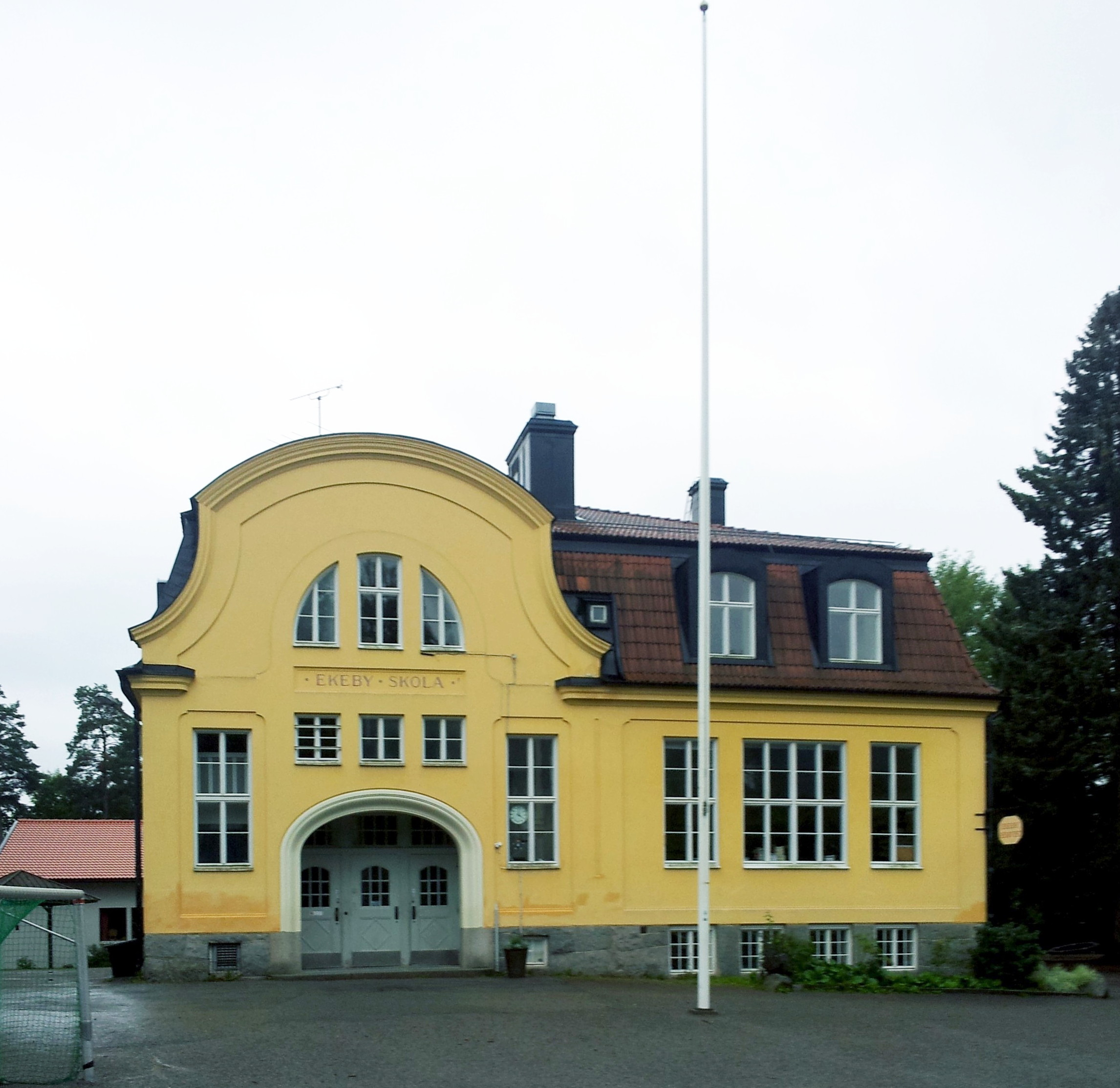 Ekeby skola, Djursholm, Danderyds kommun, Sverige, augusti 2012